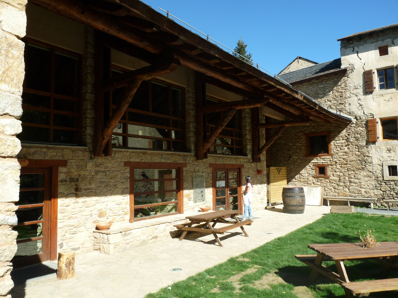 Mairie d'Eyne, Pyrénées-Orientales, France